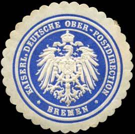 Siegelmarke der Kaiserlichen Oberpostdirektion (Bremen) nach 1888